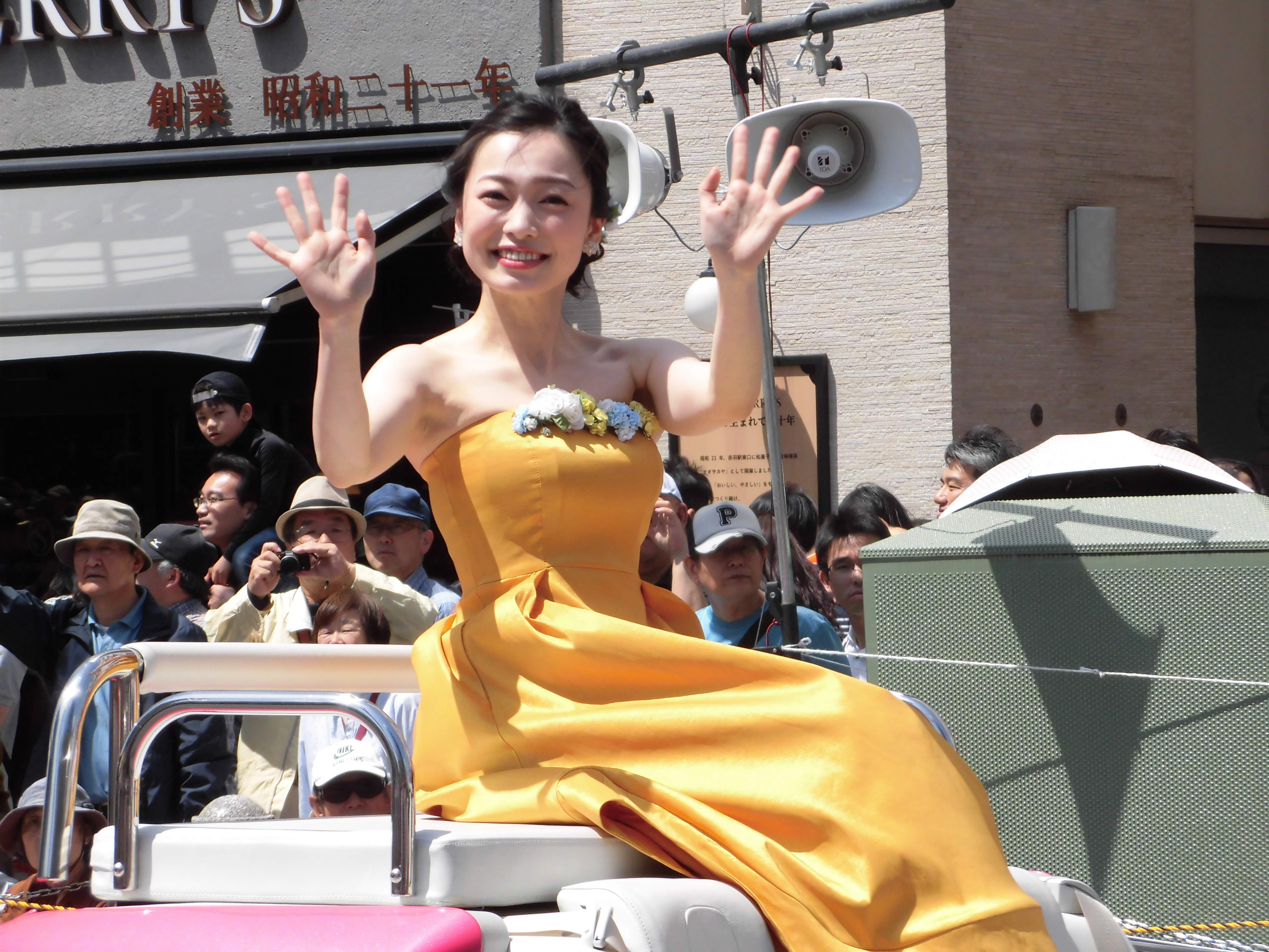 2018年度 赤羽馬鹿祭りにて